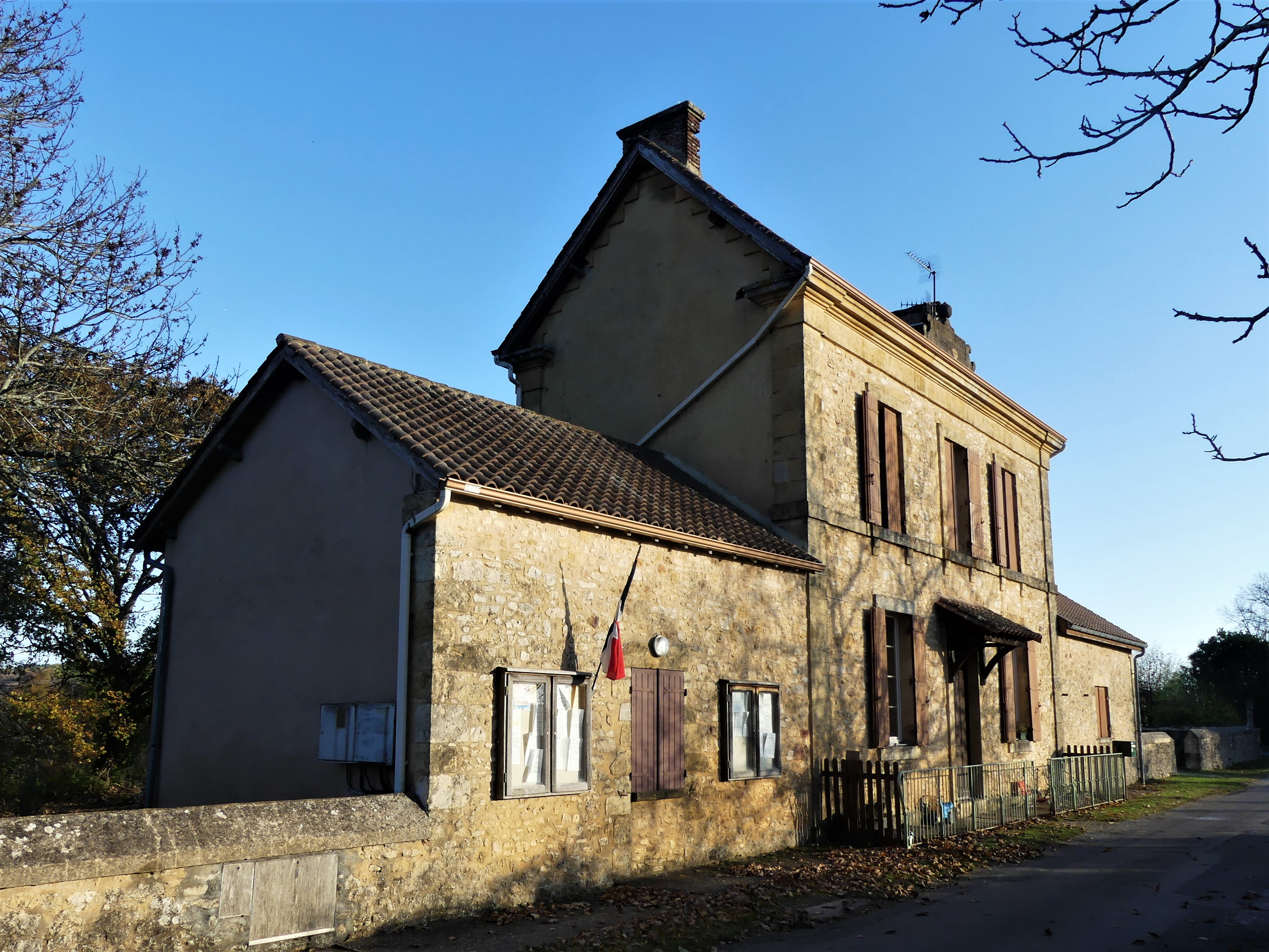 La mairie de Salles-de-Belvès, Dordogne, France